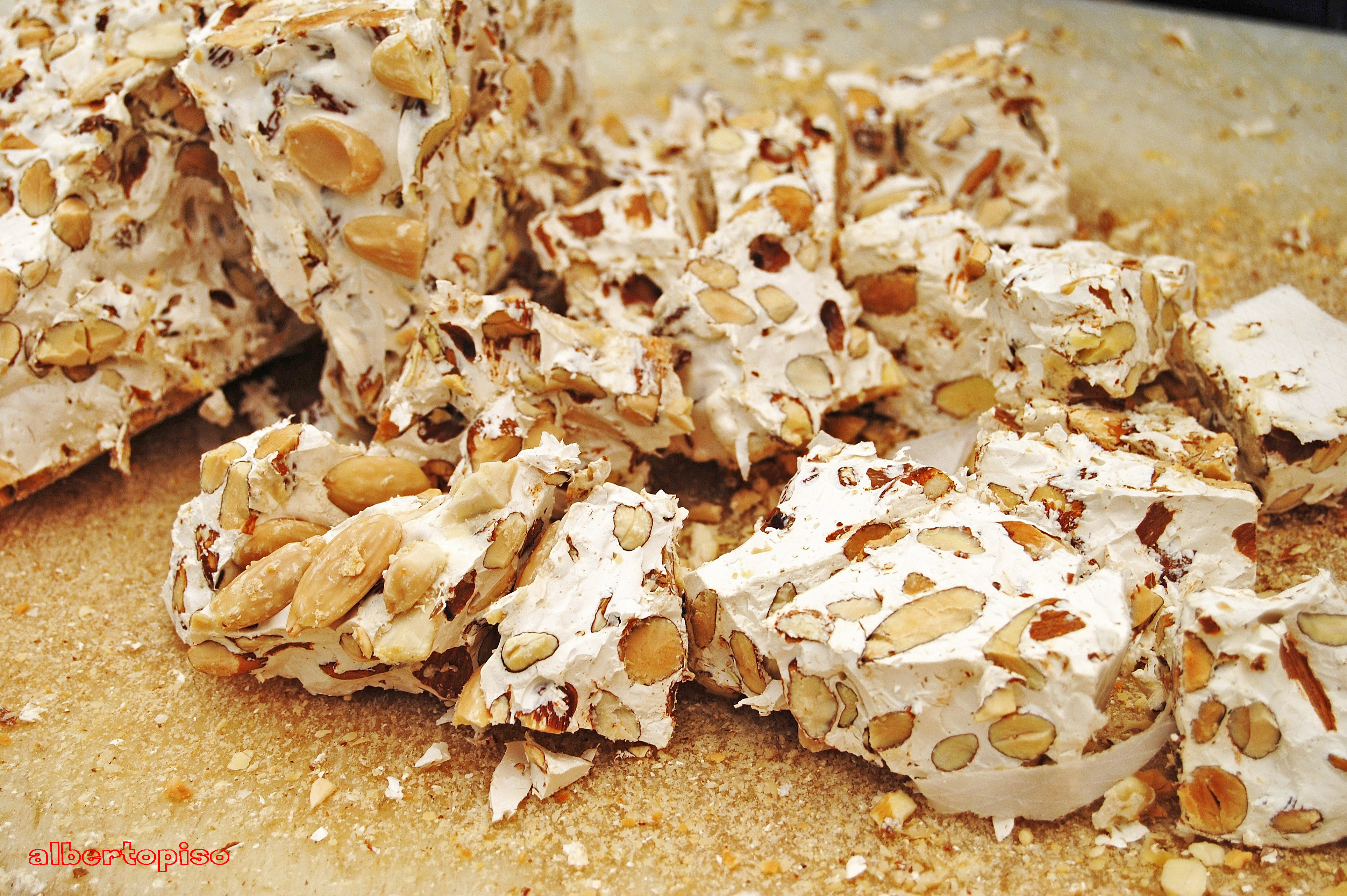 Torrone di mandorle - Italia